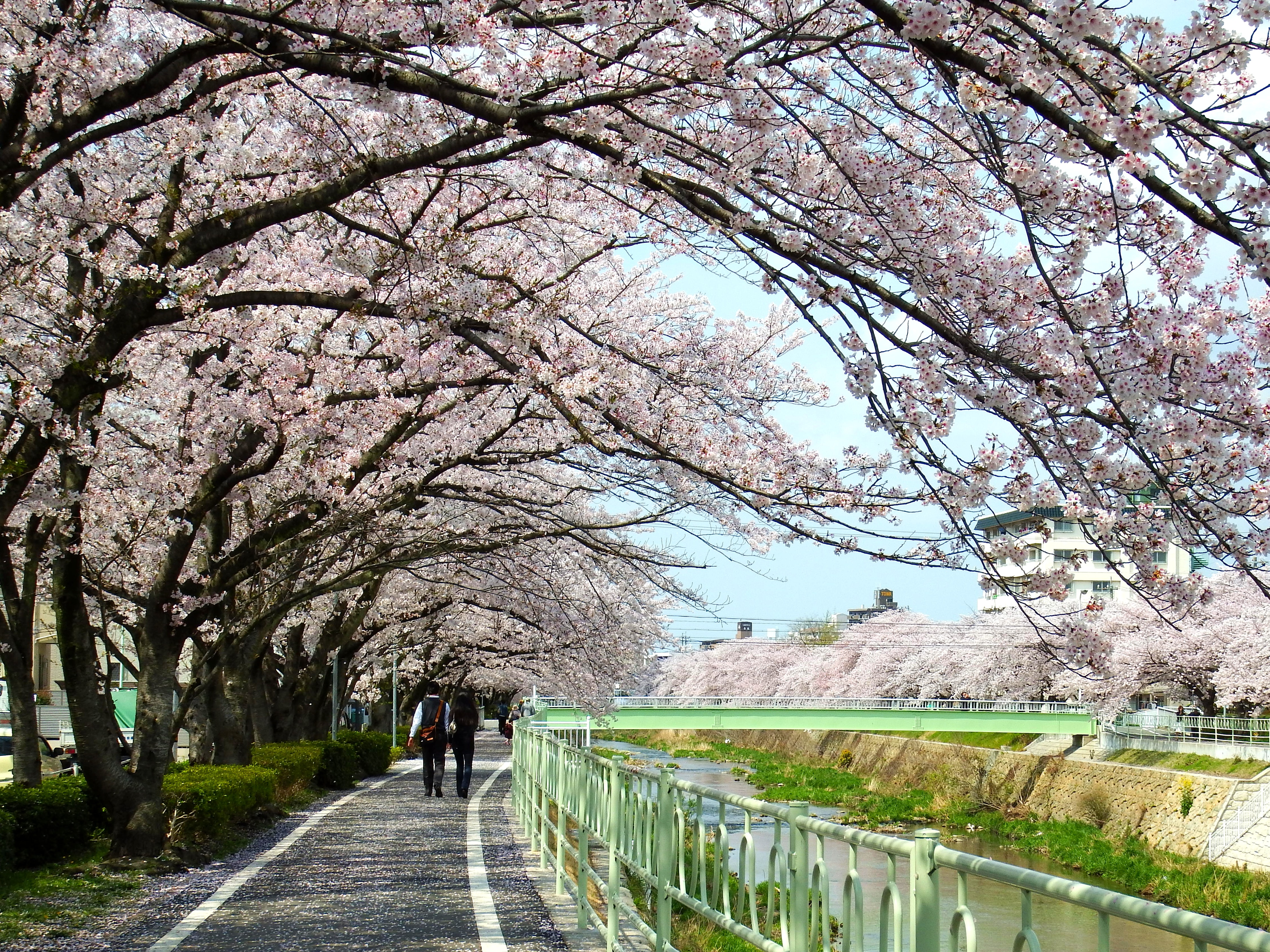 香流川2桜